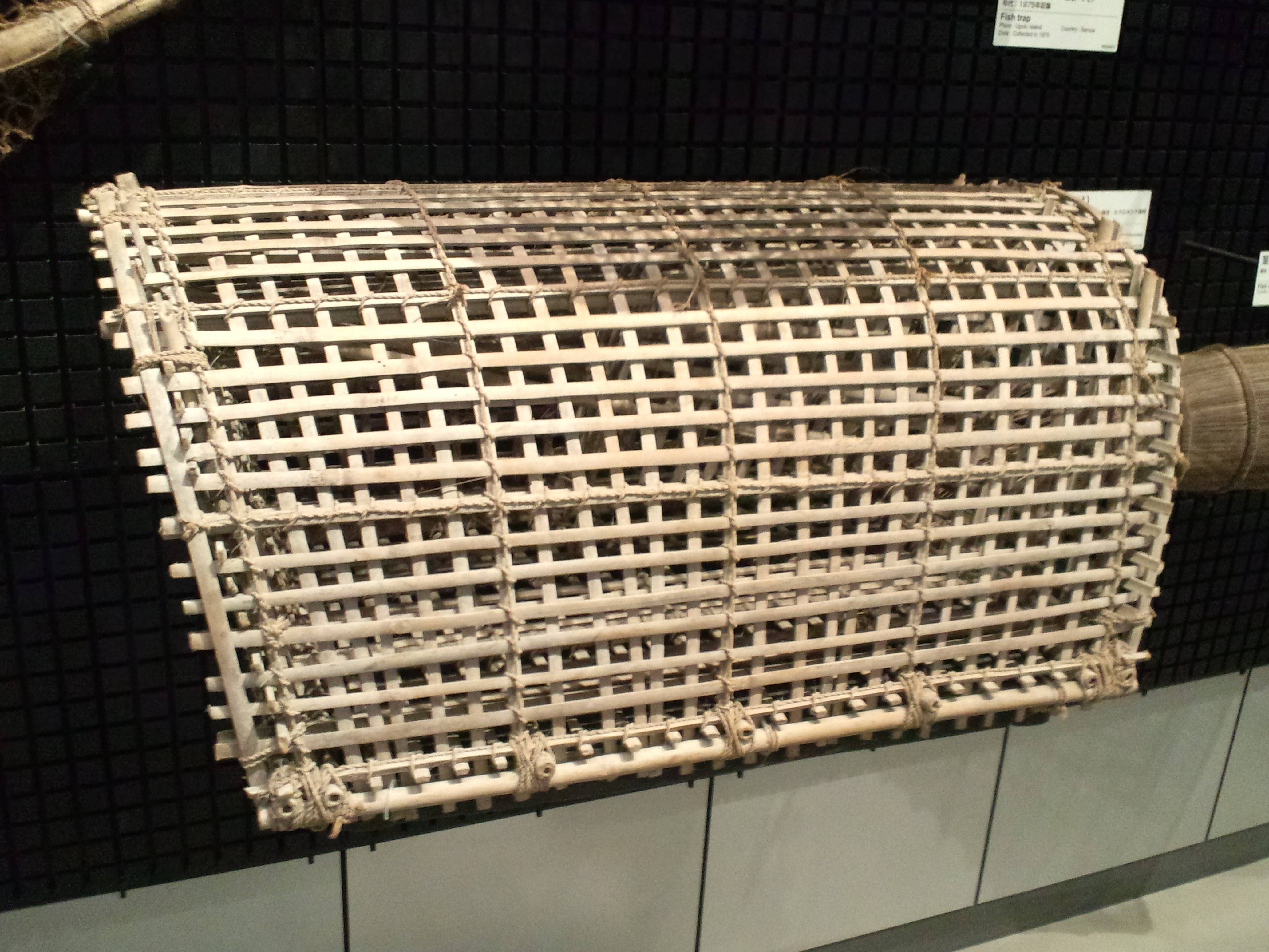 国立民族学博物館（大阪） 筌（うけ）（ミクロネシア連邦、ヤップ島、1977年収集）